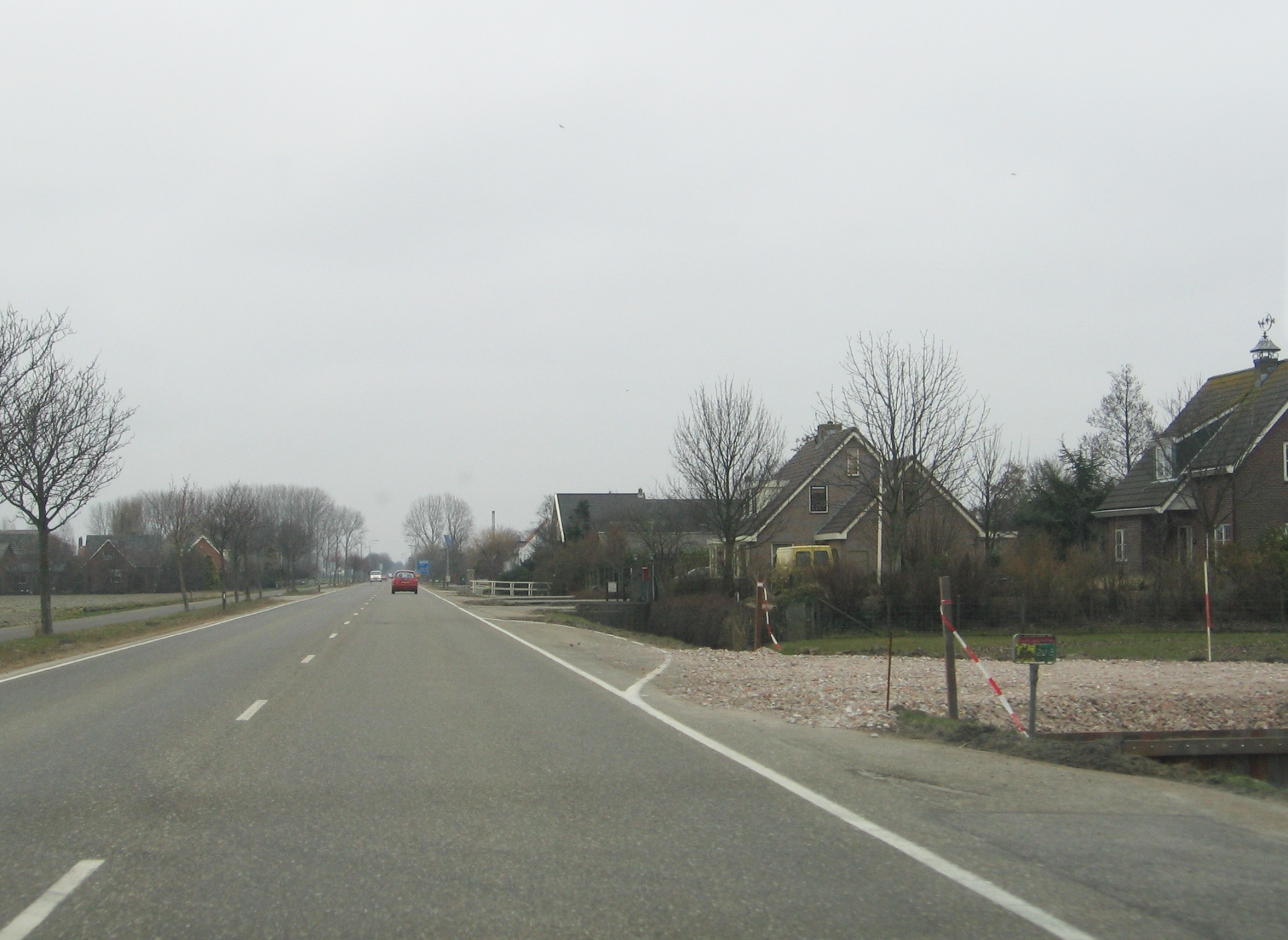 Rijnwoude and surroundings